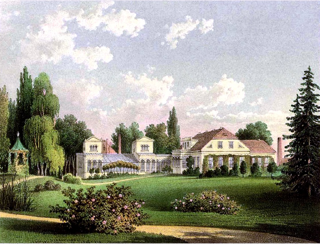 Gut Waplitz, Kreis Stuhm, Provinz Preußen